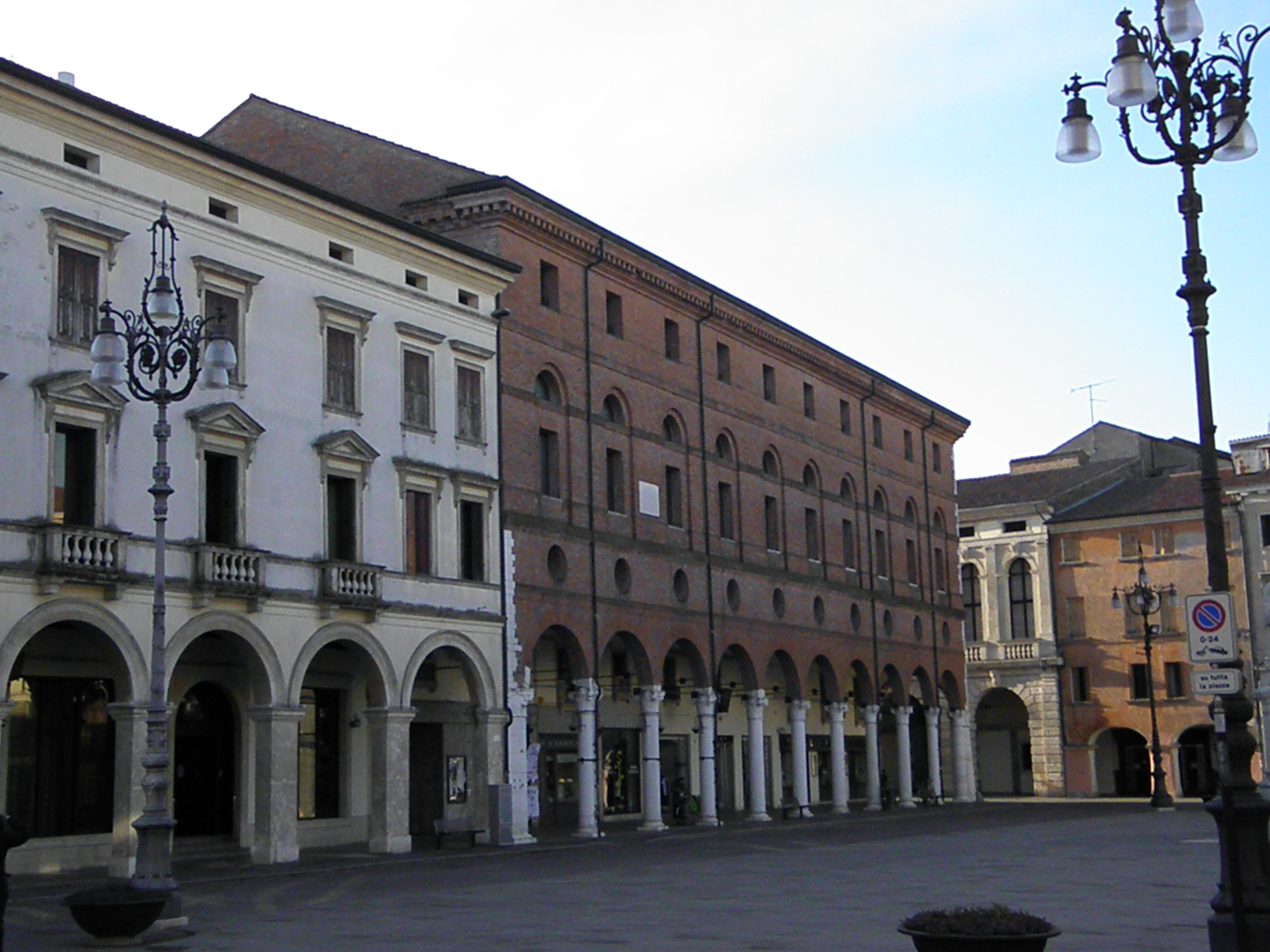 Vista del Palazzo Roverella dalla adiacente Piazza Vittorio Emanuele II, Rovigo.